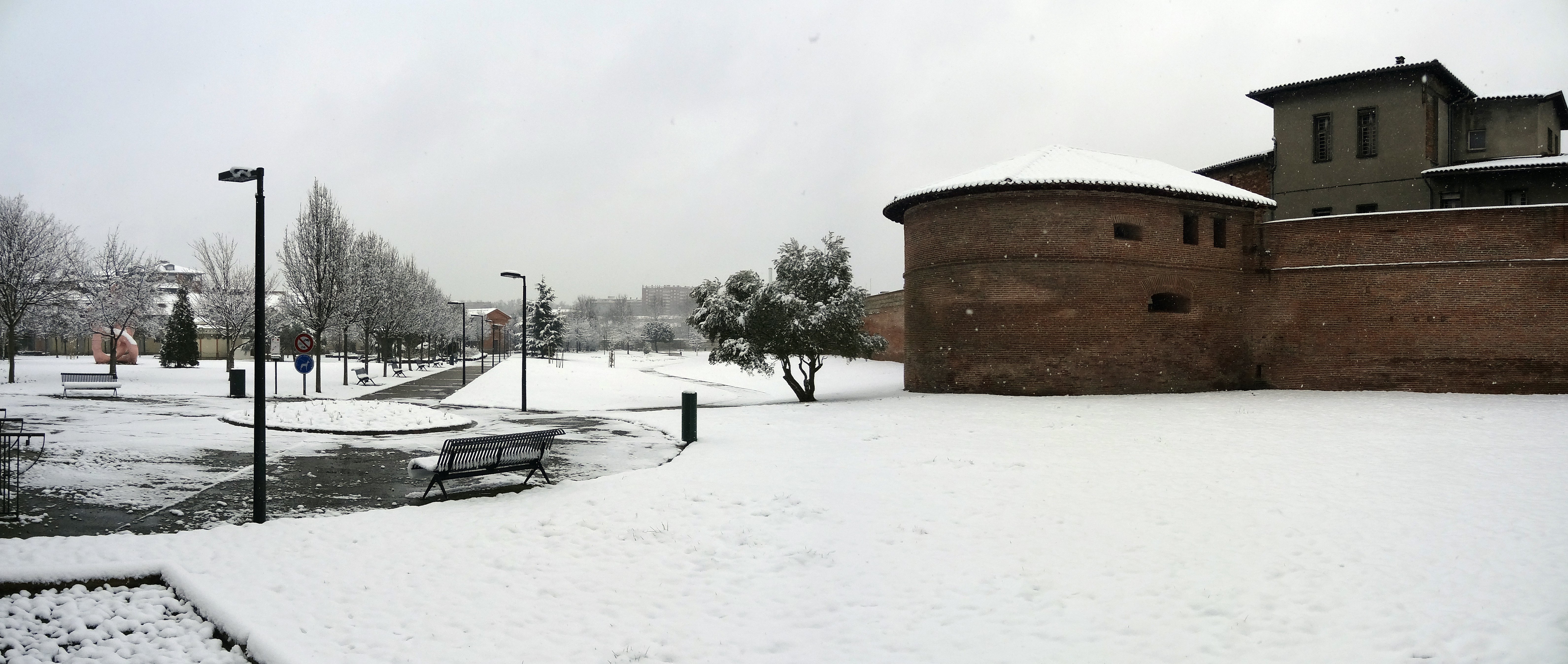 Jardin Raymond VI sous la neige